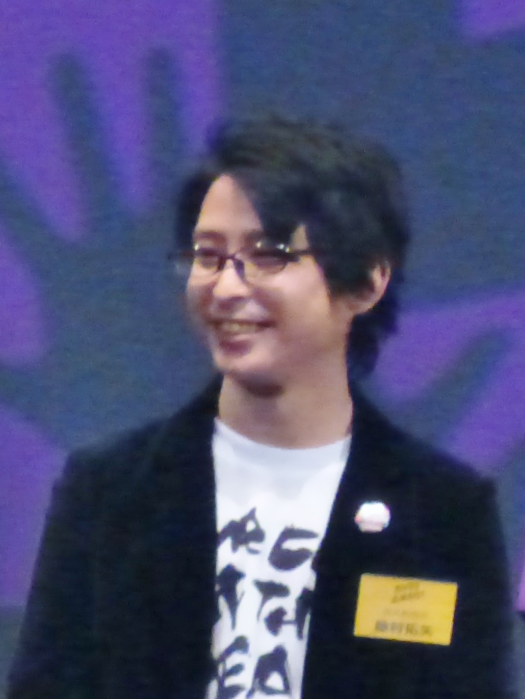 藤村拓矢（2018年11月22日、Zeppダイバーシティ東京「最高かよ〜！『カメ止め！』アツアツ感染者集会〜ポンデミック2018〜」）